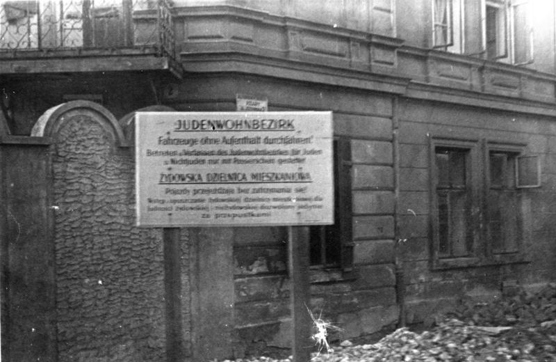 Krakau (Cracow) Einfahrt zum ehemaligen jüdischen Ghetto